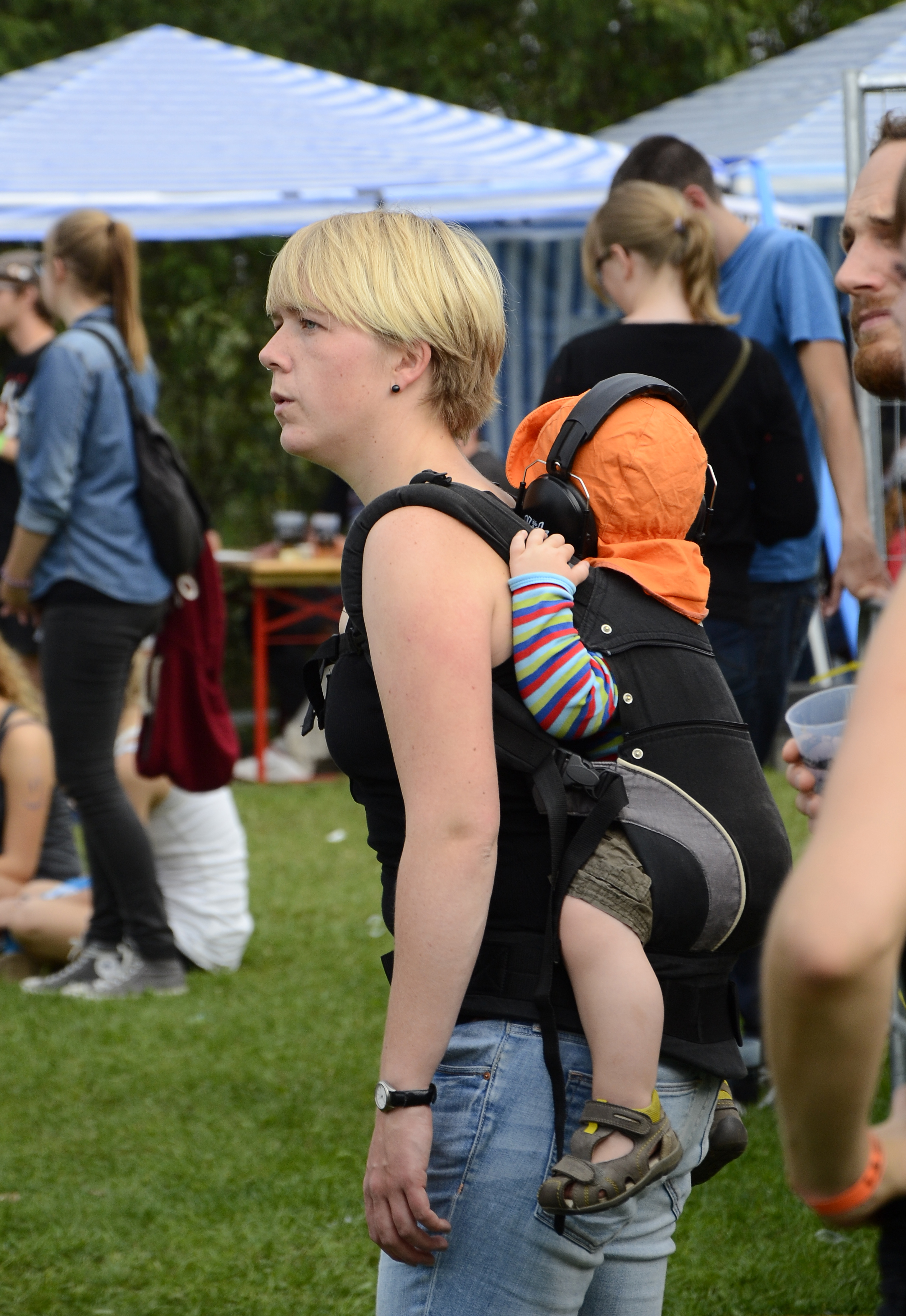 Impressionen vom Ackerfestival 2014